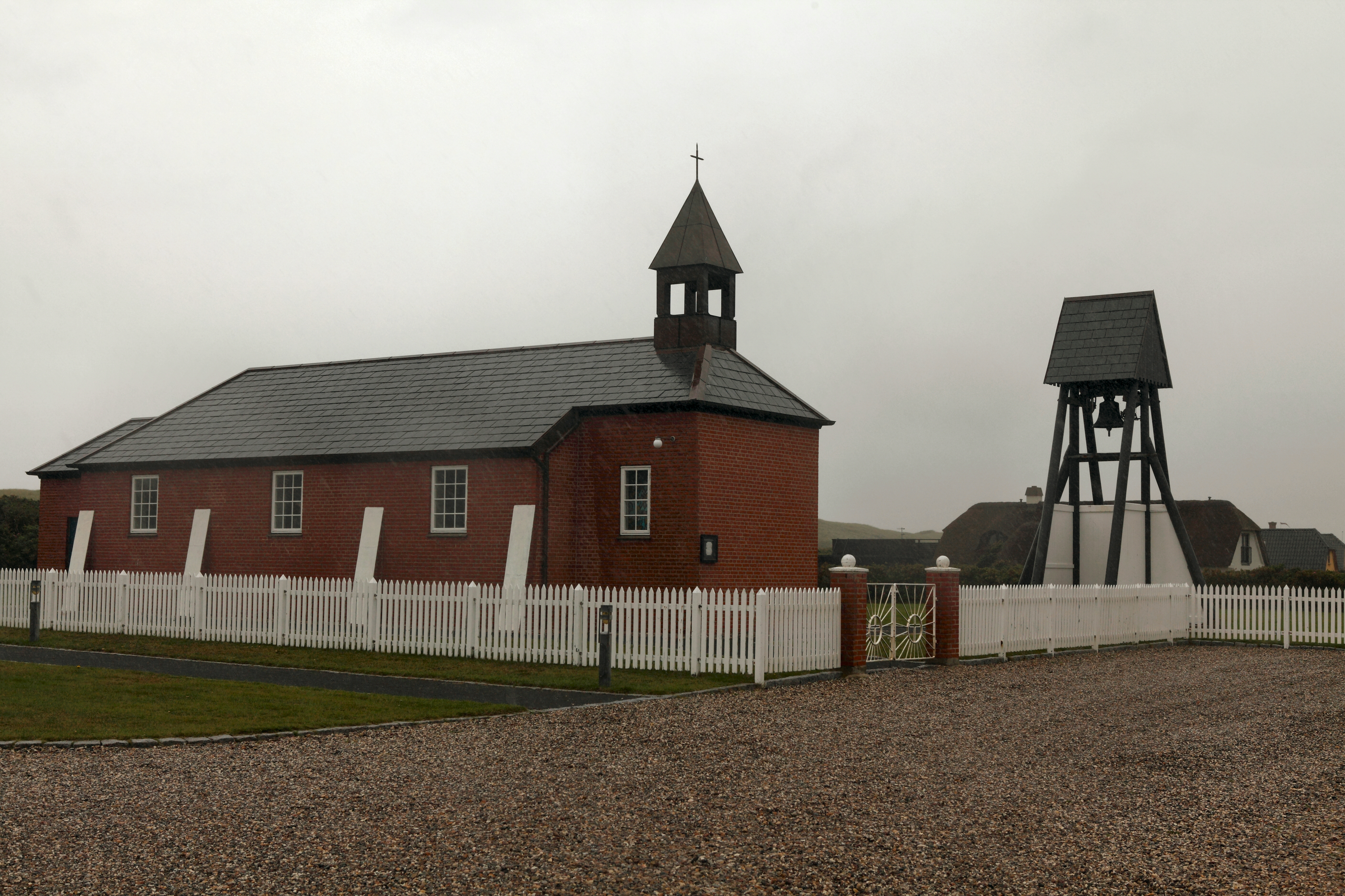 Thorminde Kirke - en ombygget redningsstation